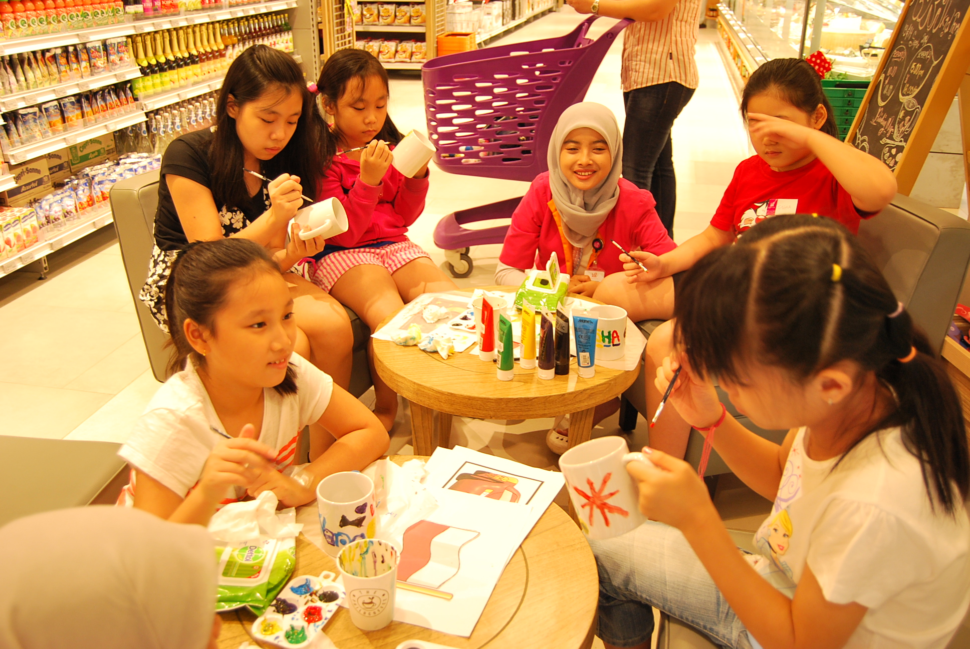 Melukis gelas jadi salah satu kegiatan mingguan anak di LOKA